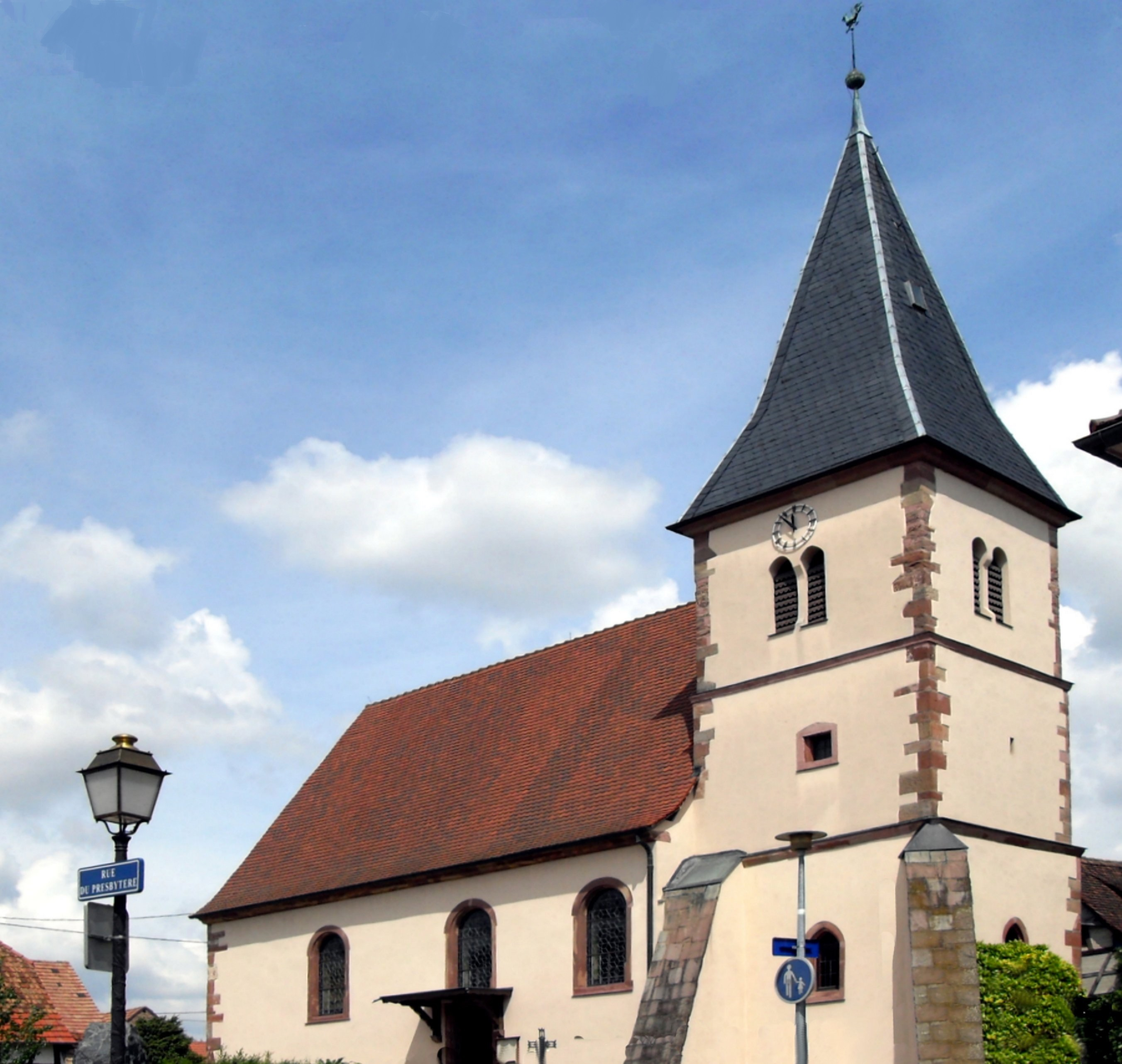 Le temple protestant d'Eckwersheim (ancienne église Saint-Jacques)